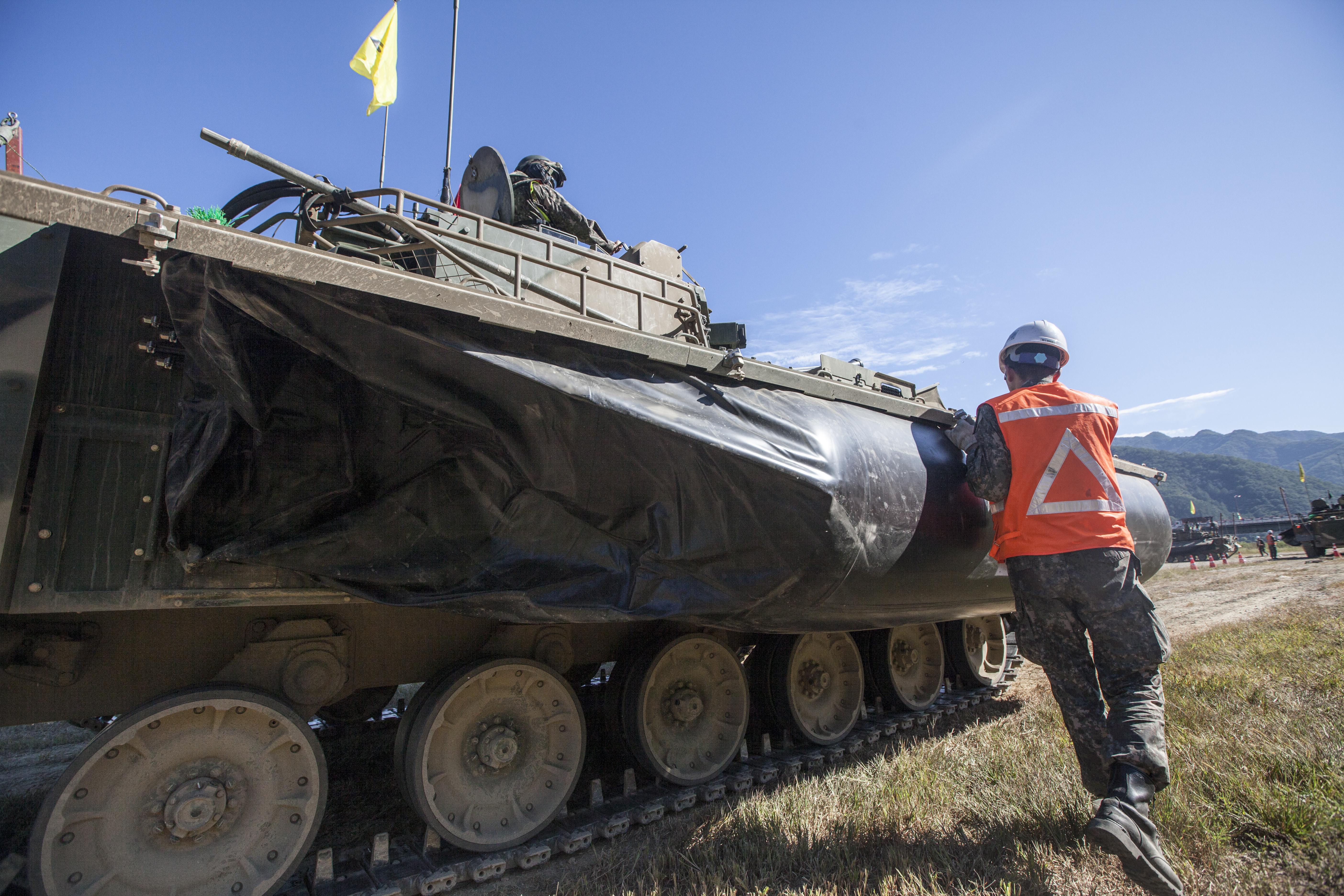 촬영 : 정승익